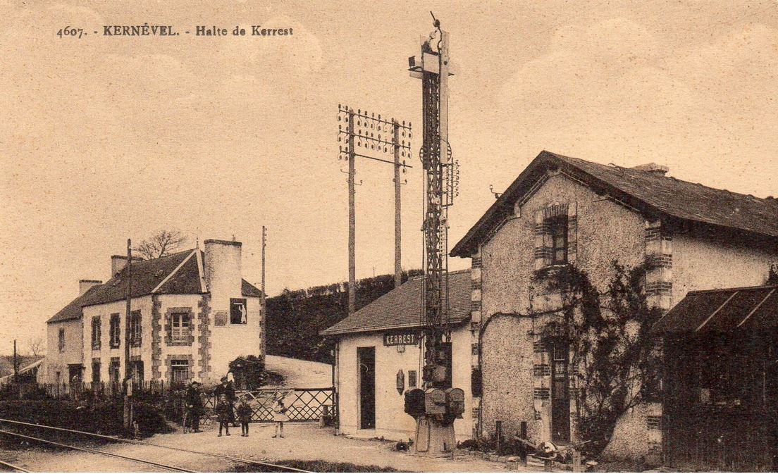 Carte postale du premier quart du vingtième siècle éditée par Villard représentant la halte de Kerrest.